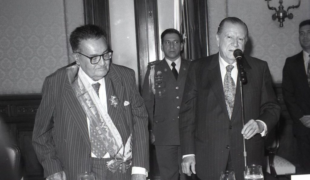 Homenaje del presidente Rafael Caldera al escritor Luis Beltrán Guerrero, en el Palacio de Miraflores.